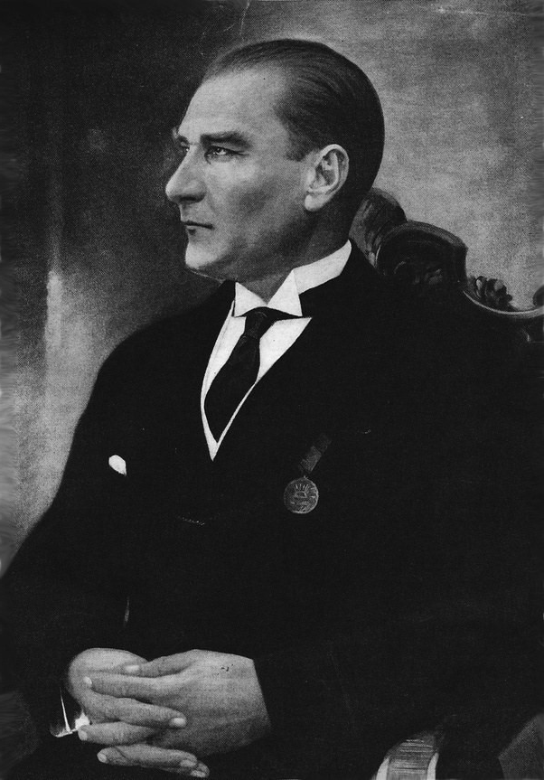 Mustafa Kemal Atatürk (1881 – 1938)